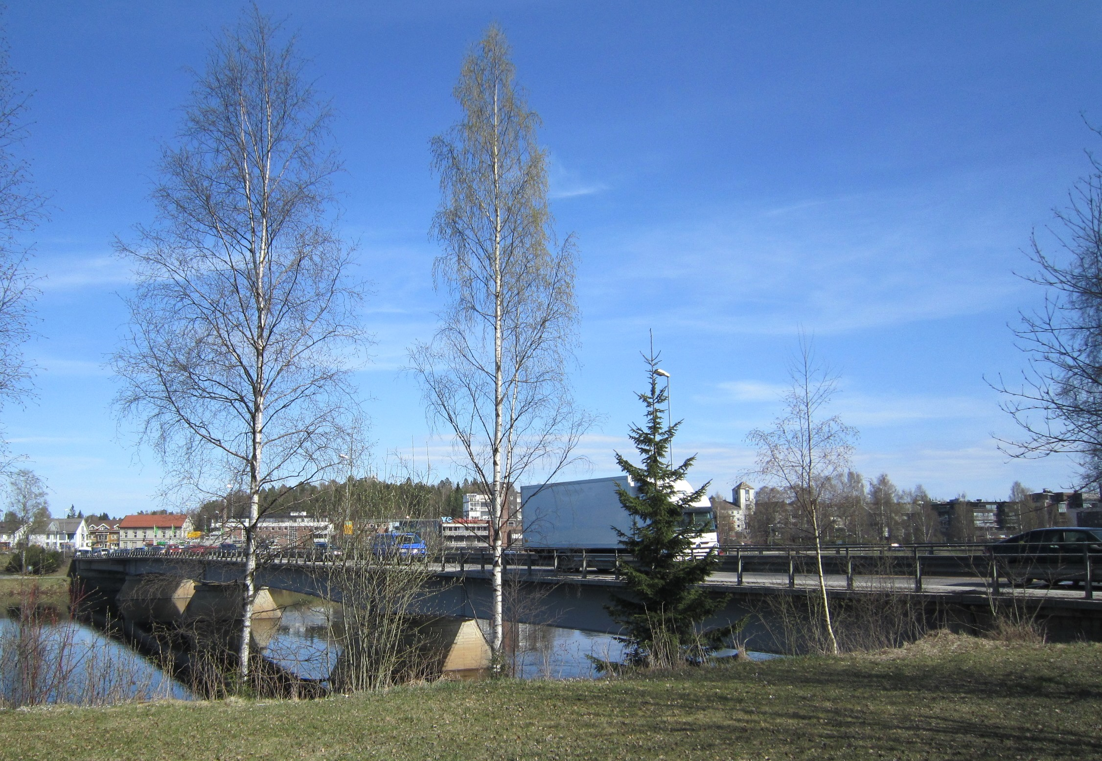 Glåmbrua i Elverum sett fra Glommas vestbredd